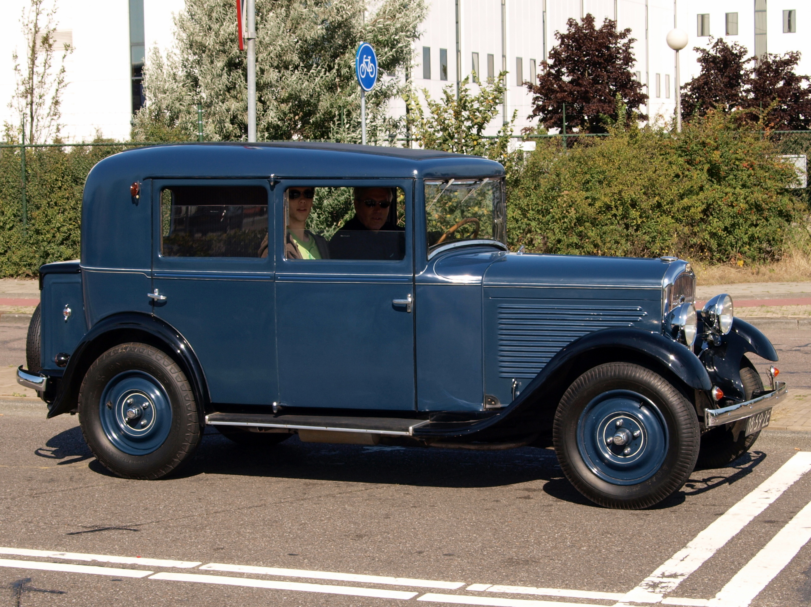 Peugeot 201 C 18-59-ZE